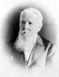 Фёдор Григорьевич Солнцев (1801—1892) — русский художник, архитектор и историк.